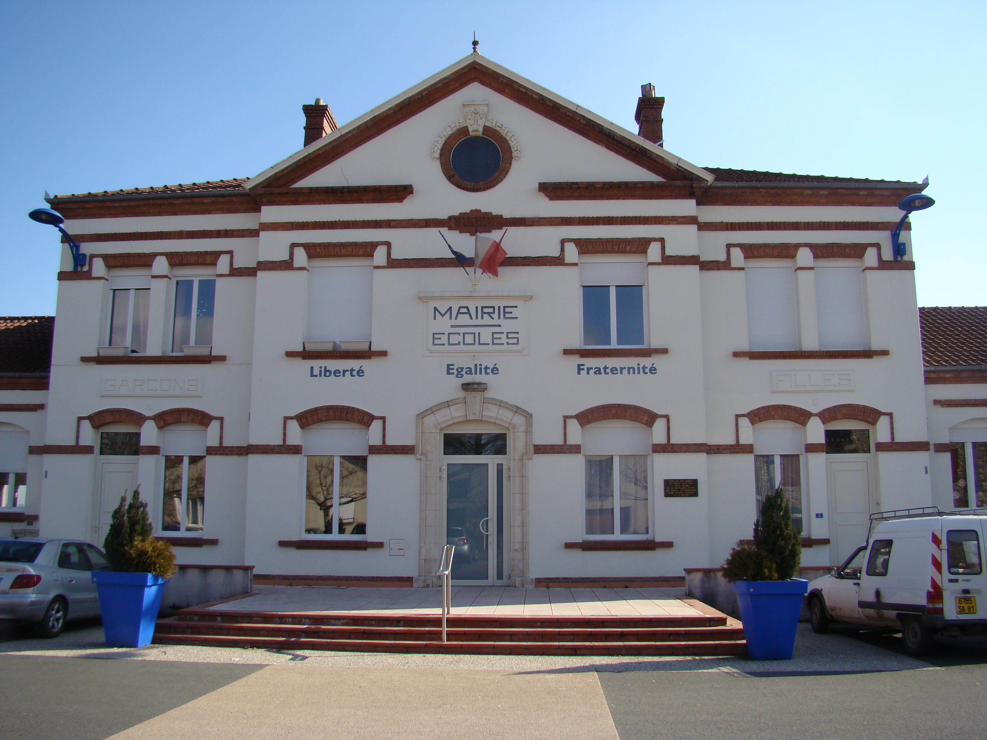 Mairie de Mirandol-Bourgnounac